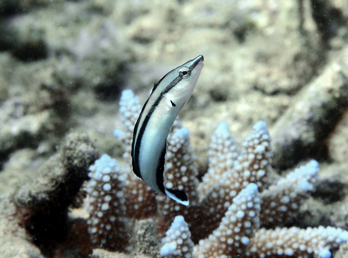 Une blennie à dents de sabre ou faux nettoyeur (Aspidontus tractus), mimétique de Labroides dimidiatus à la Réunion.